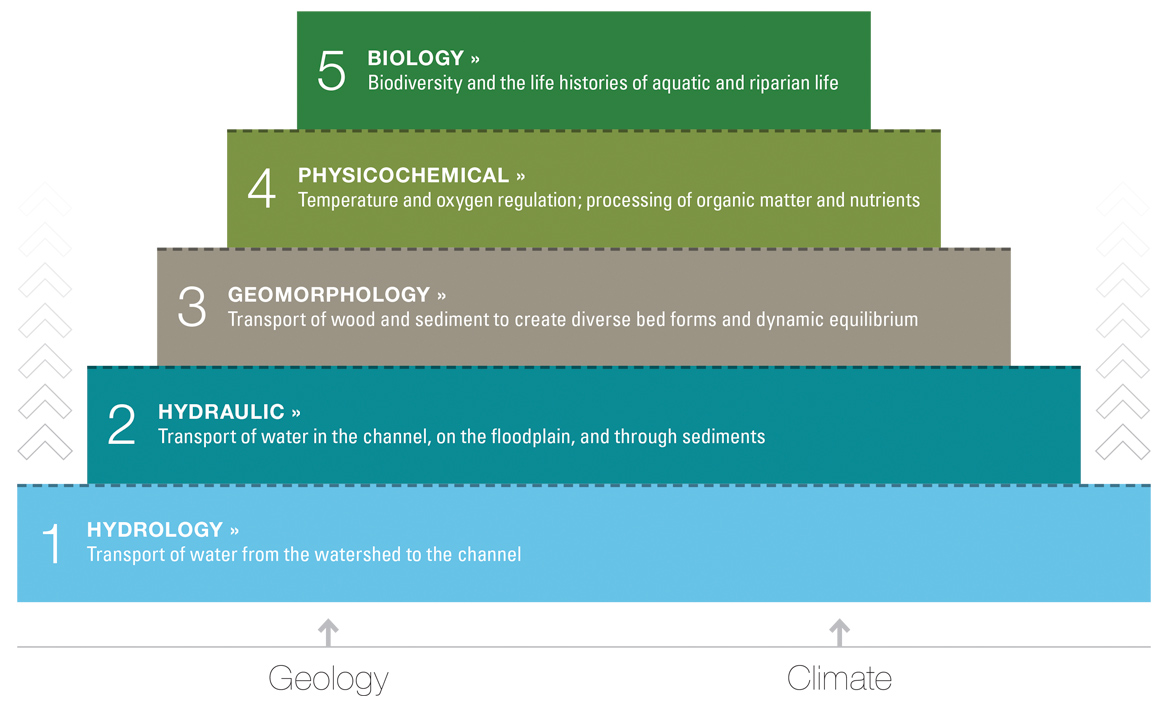 Pyramide des fonctions écologiques des cours d'eau